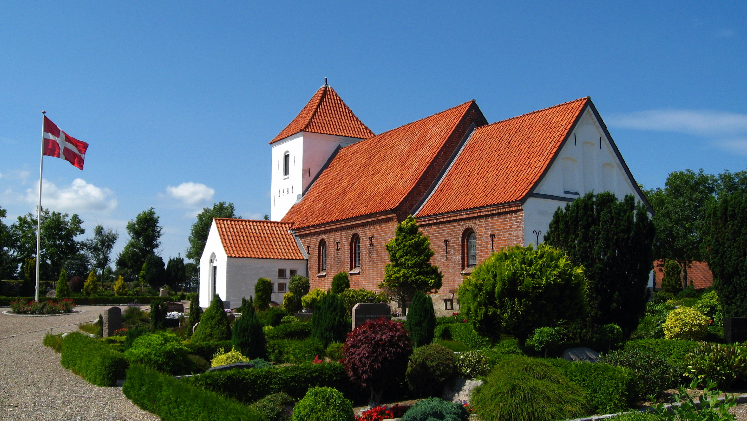 Øster Svenstrup Kirke